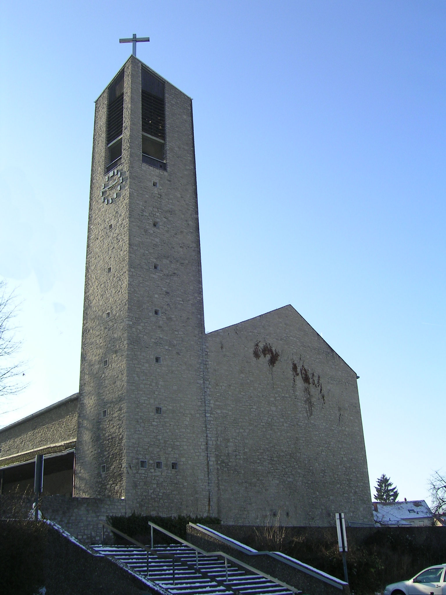 Evangelische Heilig-Geist-Kirche, Bad Vilbel-Heilsberg, Germany own photography, 1.1.2006